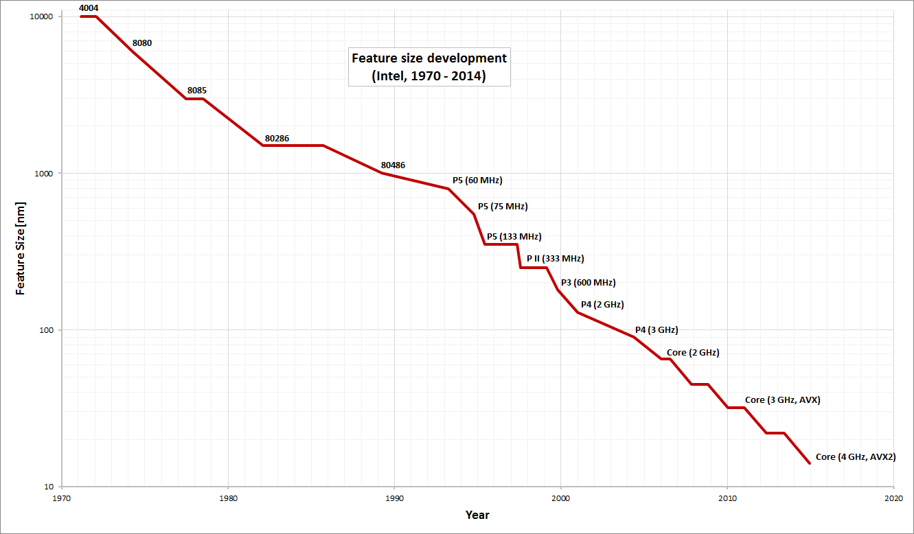 Entwicklung der Strukturgröße (Intel) an un-formatted (maybe un-useable broken) listing with values can be found in the source of this page